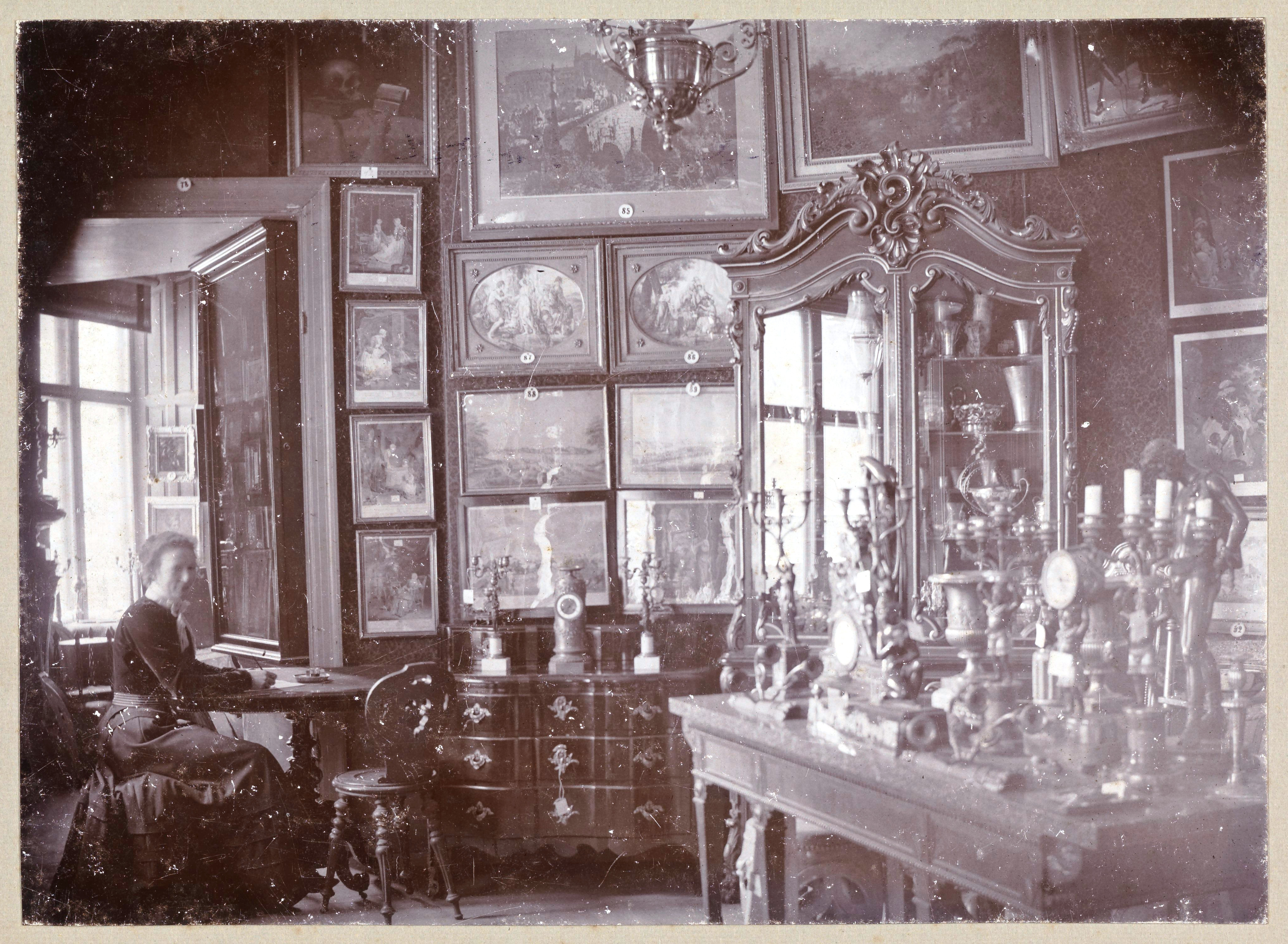 Antykwariat Henryka Bukowskiego w Sztokholmie, sala okrągła